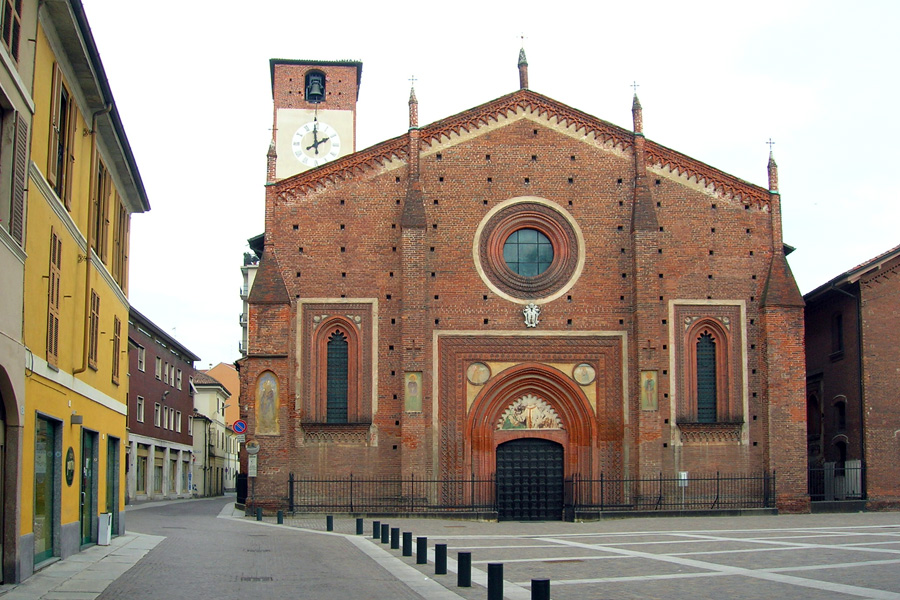 Il duomo di Mortara (PV)